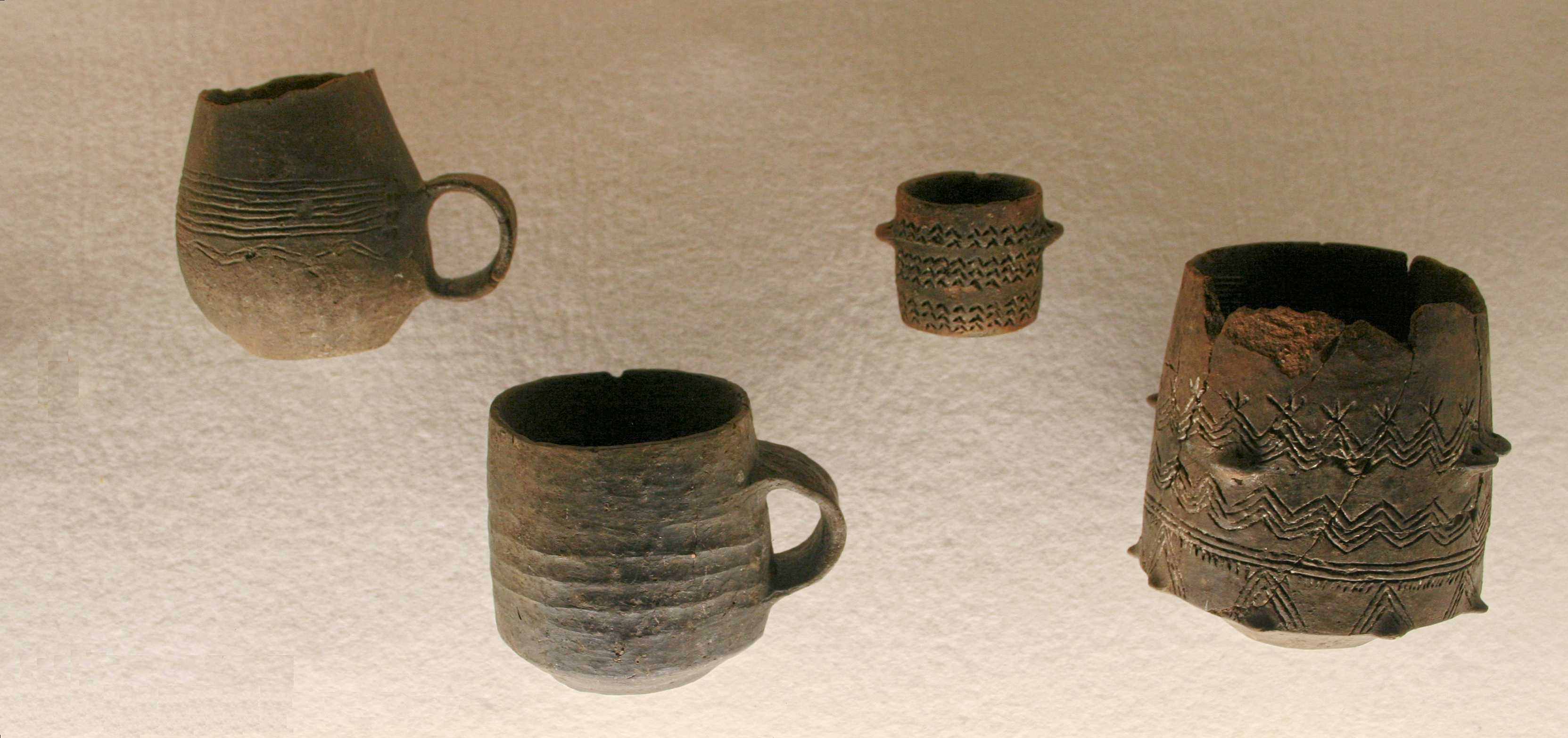 Auswahl der Bernburger Keramikfunde aus der Totenhütte von Benzingerode